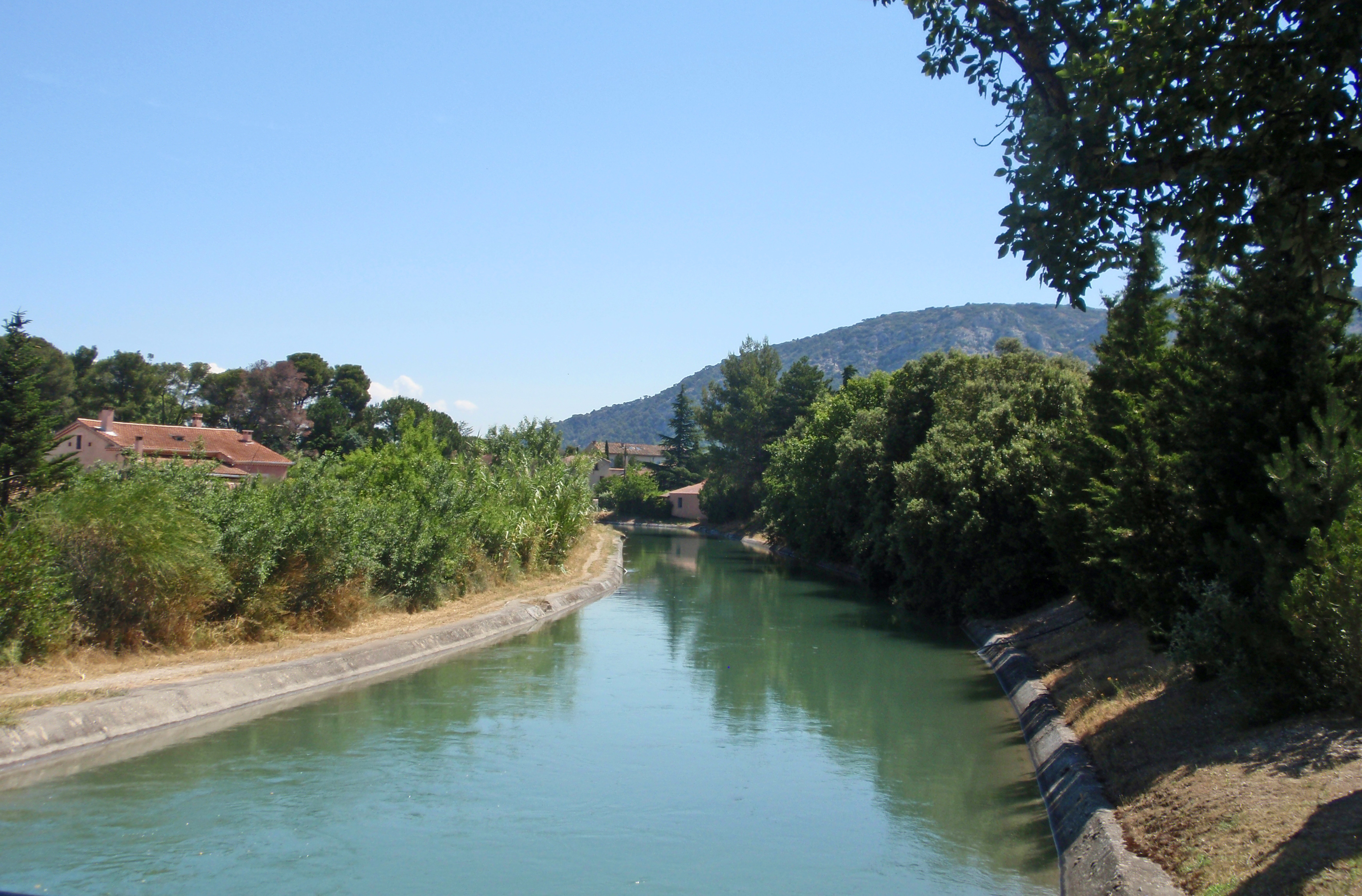 Canal de Carpentras, Les Taillades, Vaucluse, France